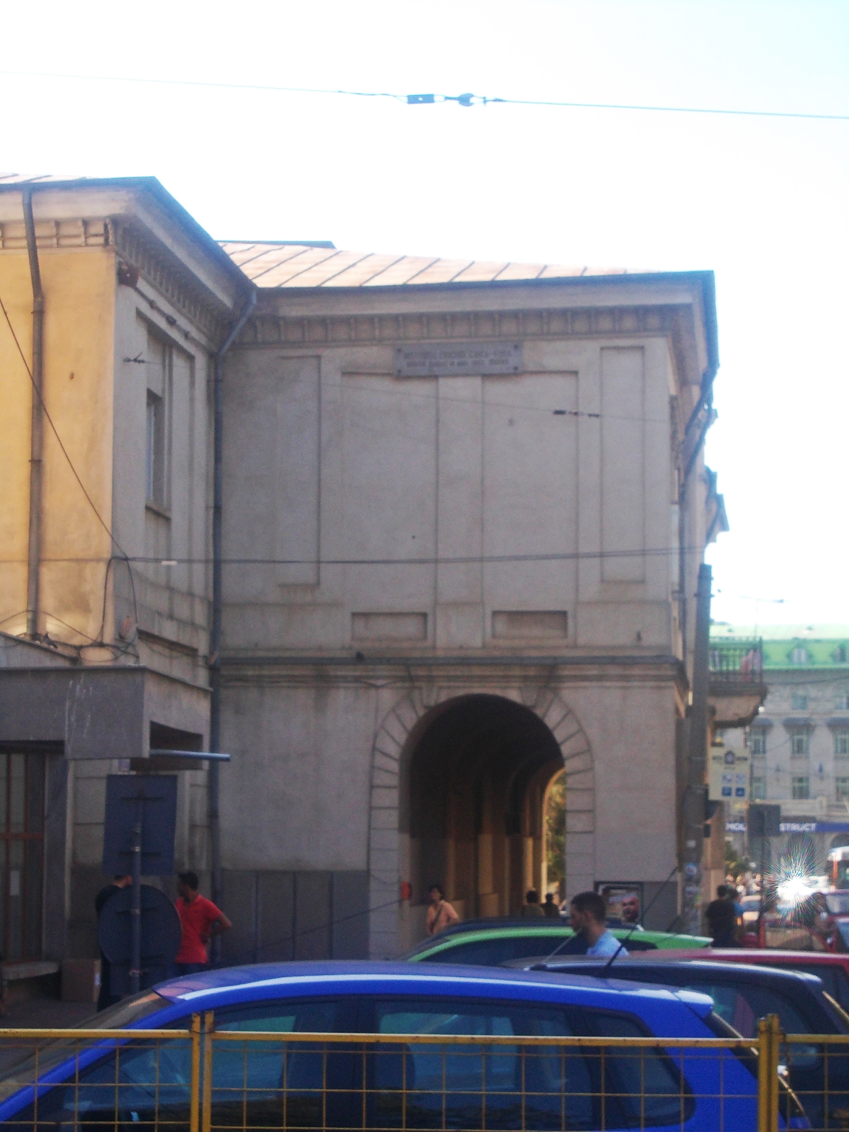 municipiul Iași, Str. Cuza Vodă 34 01